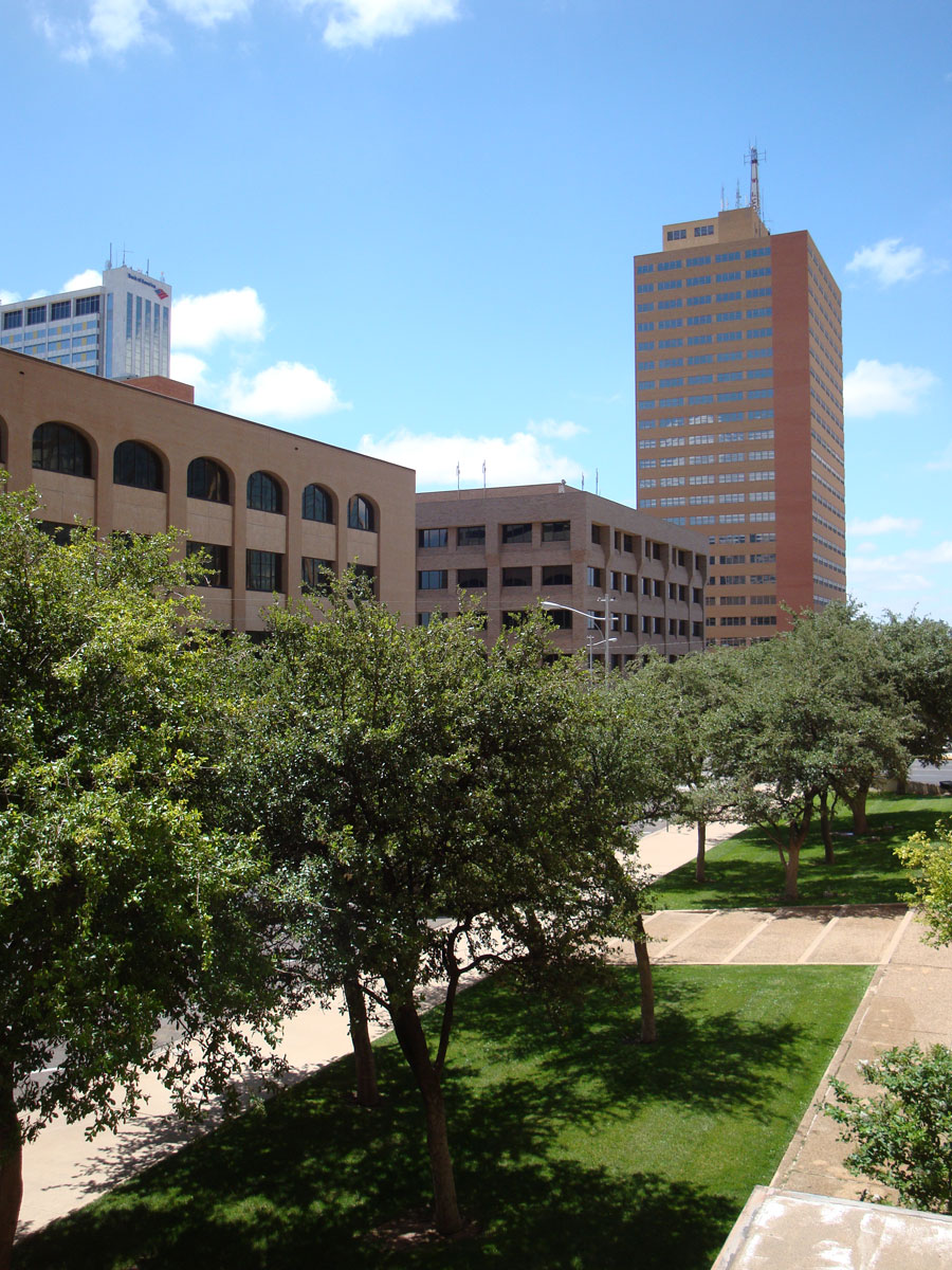 Orange